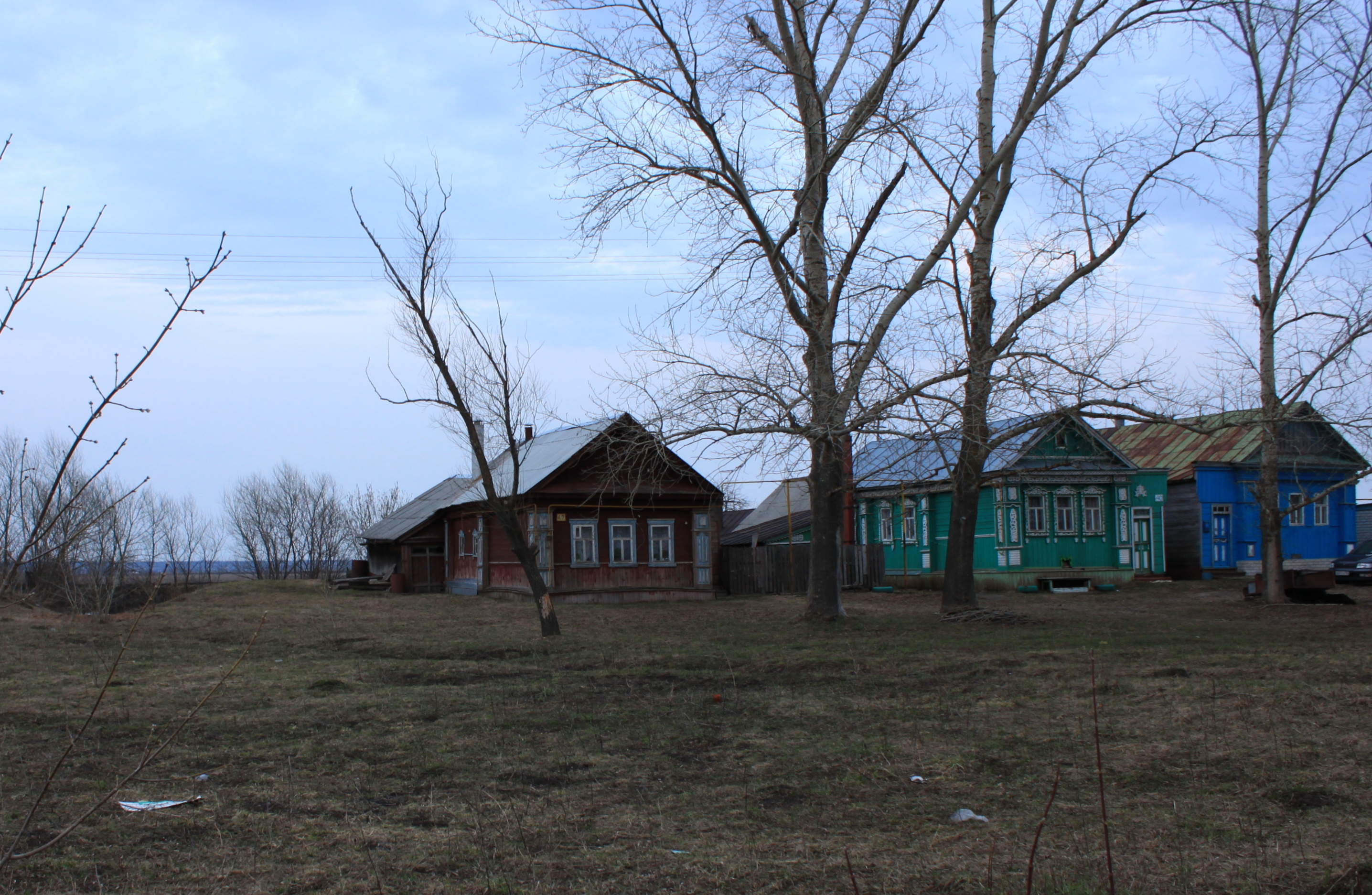 Веригино Арзамасский район